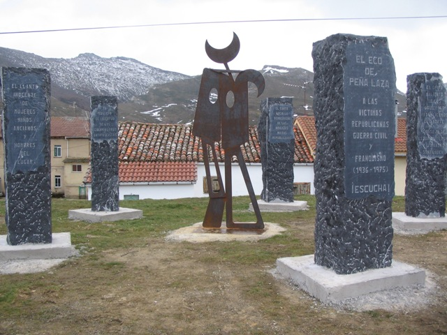 Monolitos a las víctimas de la guerra civil